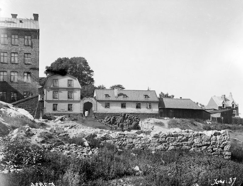 Värdshuset Lilla Ingemarshof på 1890-talet vid Roslagsgatan. Kv. Kråkan, nuvarande Blåkråkan